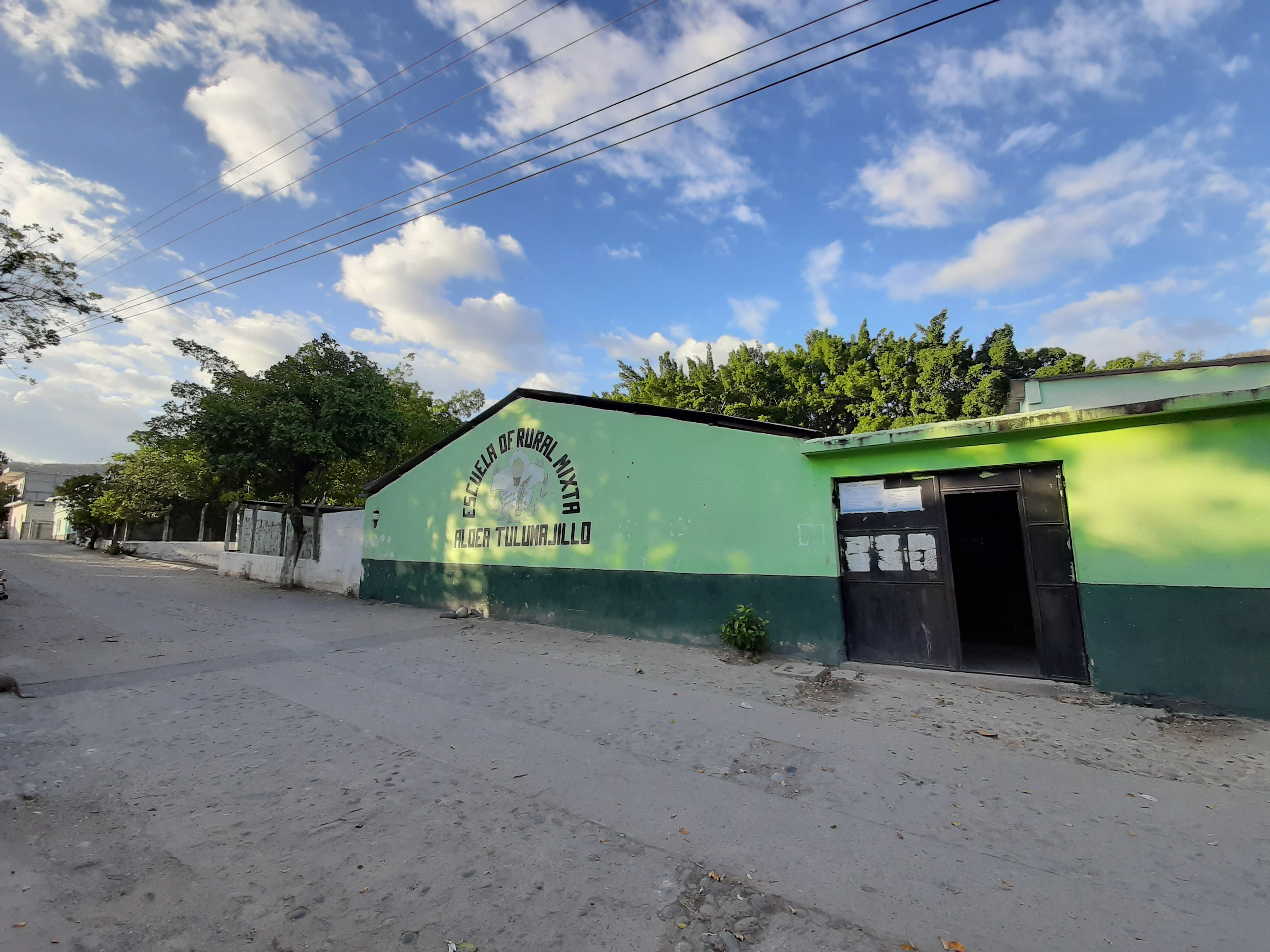 Exterior de escuela